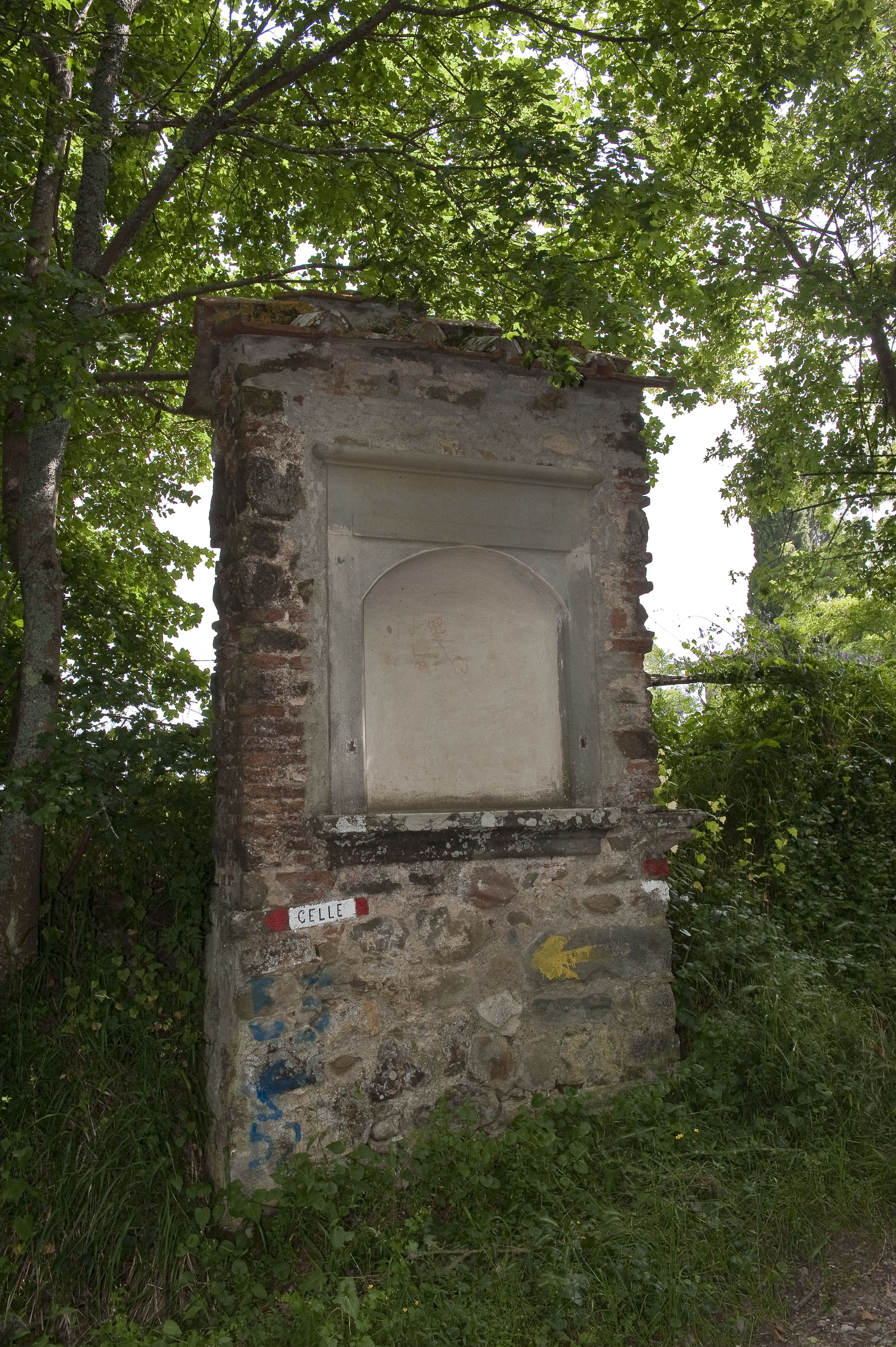 Tabernacolo situato nei pressi dell'abbazia di san Cassiano a Montescalari. Questo tabernacolo è citato nel romanzo di Marco Vichi "Morte a Firenze" per l'iscrizione incisa in esso: "Omne Movet Urna Nomen Orat"